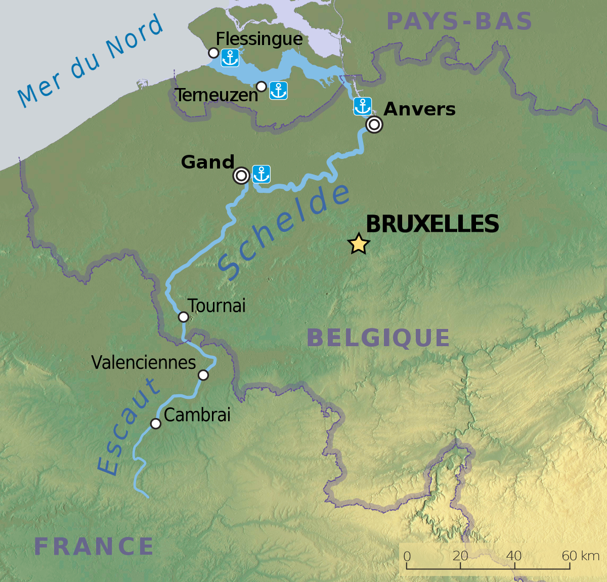 Tracé de l'Escaut depuis la France aux Payus-Bas, en passant par la Belgique. Basé sur l'image File:BelgiumGeography.png.